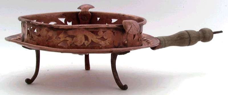 Lite fyrfat av kobber for oppvarming av kjeler, trolig laget rundt midten av 1700-tallet. Foto Norsk Folkemuseum, NF.1911-1324.